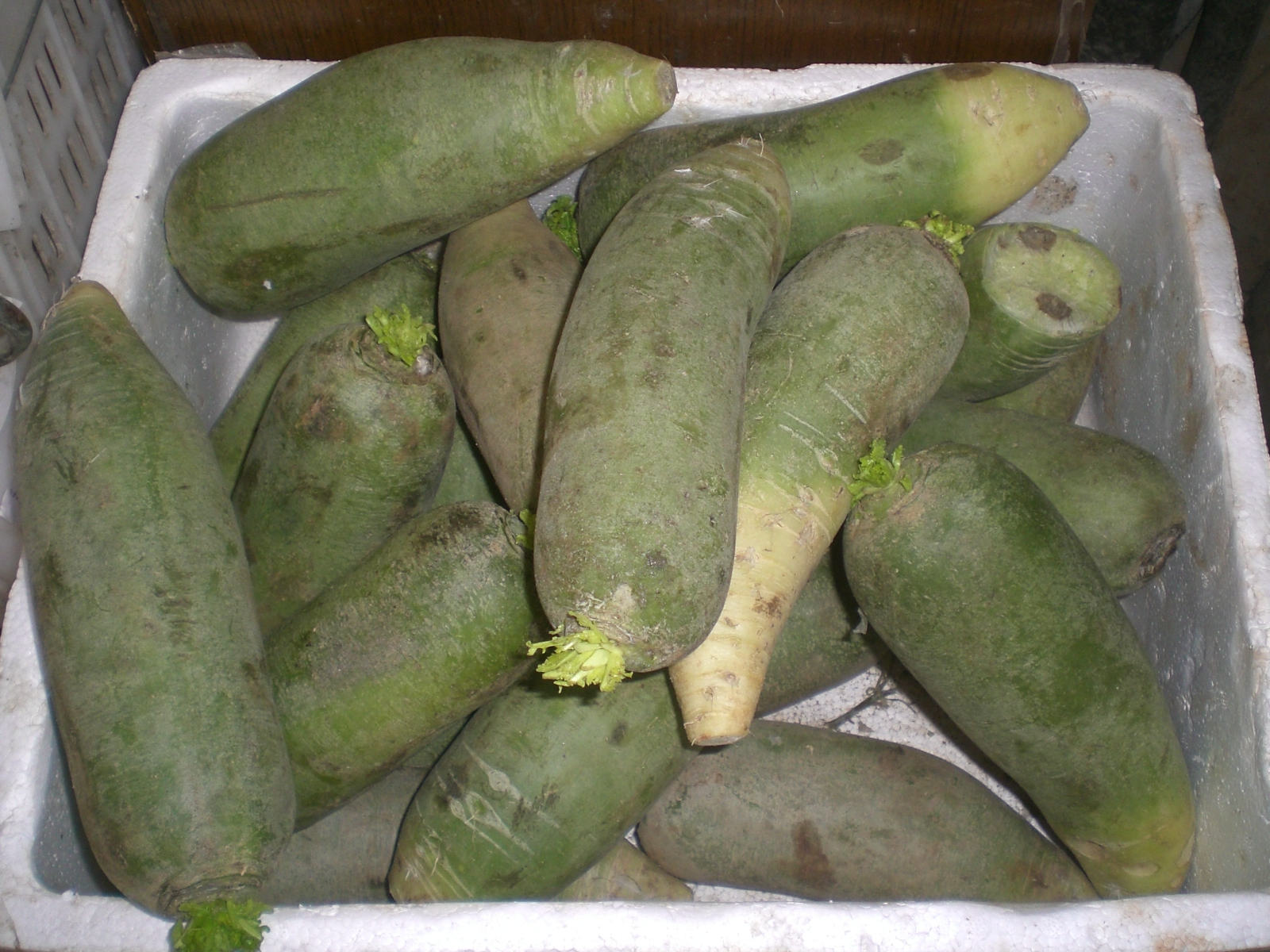 青蘿蔔